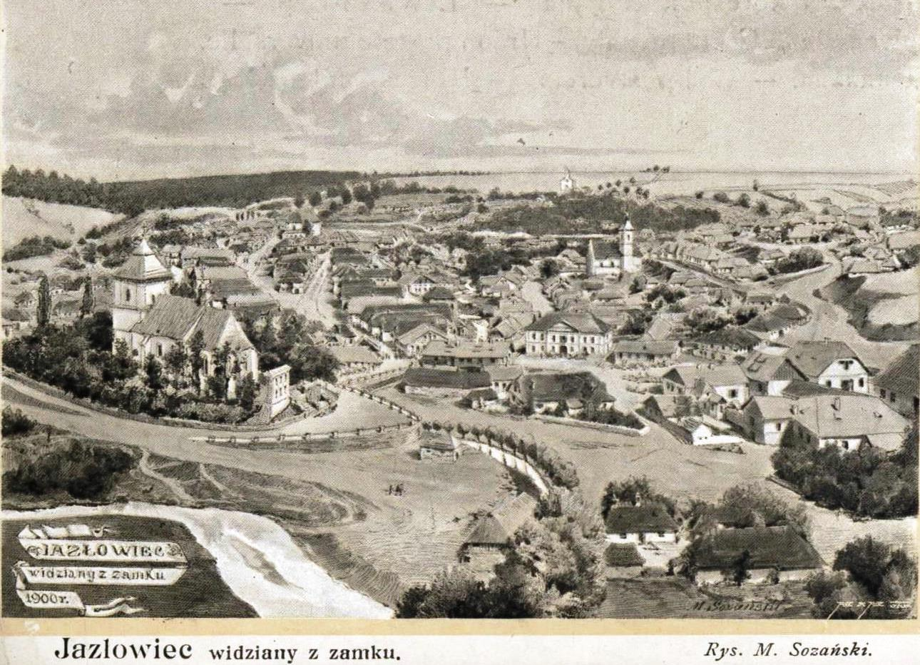 Язловець у 1900 році, на малюнку видна також старовинна синагога